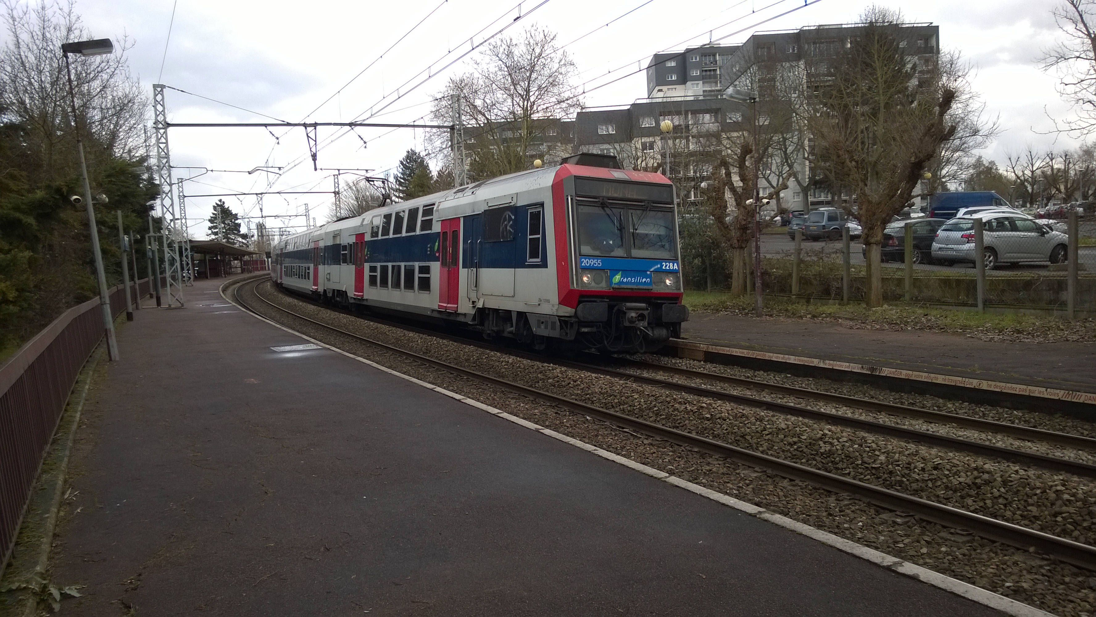 Une unité multiple de Z 20900 s'arrêtera quelques secondes plus tard en gare du Chemin d'Antony.